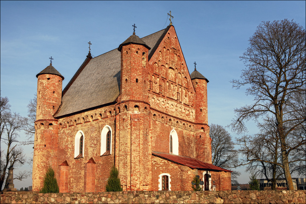 Сынкавіцкая царква. 2013